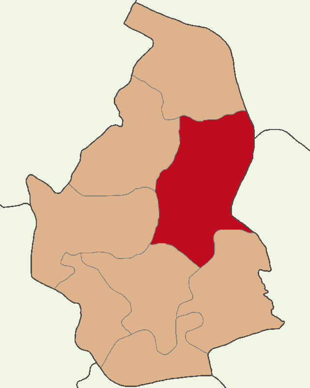 Avanos ilçesinin konumu